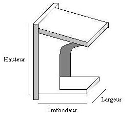 Nichoir de type ouvert Auteur : C Watier Date : juillet 2006